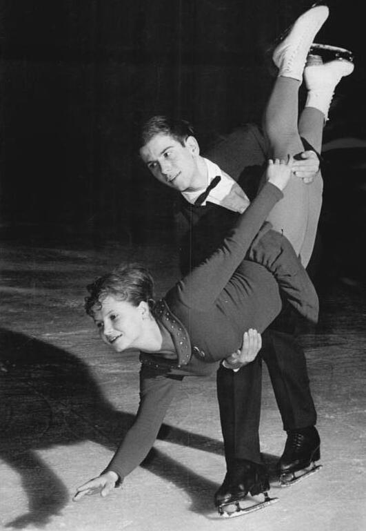 Brigitte Wokoeck, Heinz-Ulrich Walther Zentralbild Kohls 28.1.1962 Deutsche Meisterschaft im Eiskunstlaufen 1962. Die deutschen Eiskunstlauf-Meisterschaften fanden vom 26. - 27.1.1962 in der Berliner Werner-Seelenbinder-Halle statt. UBz: Im Paarlaufen konnten Brigitte Wokoeck - Heinz-Ulrich Walther (SC Dynamo Berlin) den begehrten Titel erringen und wurden neuer Deutscher Meister.